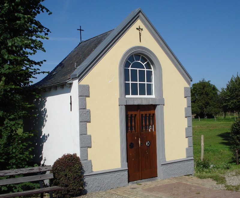 Rijksmonument 28084 - wegkapelletje Pasestraat, Maastricht.